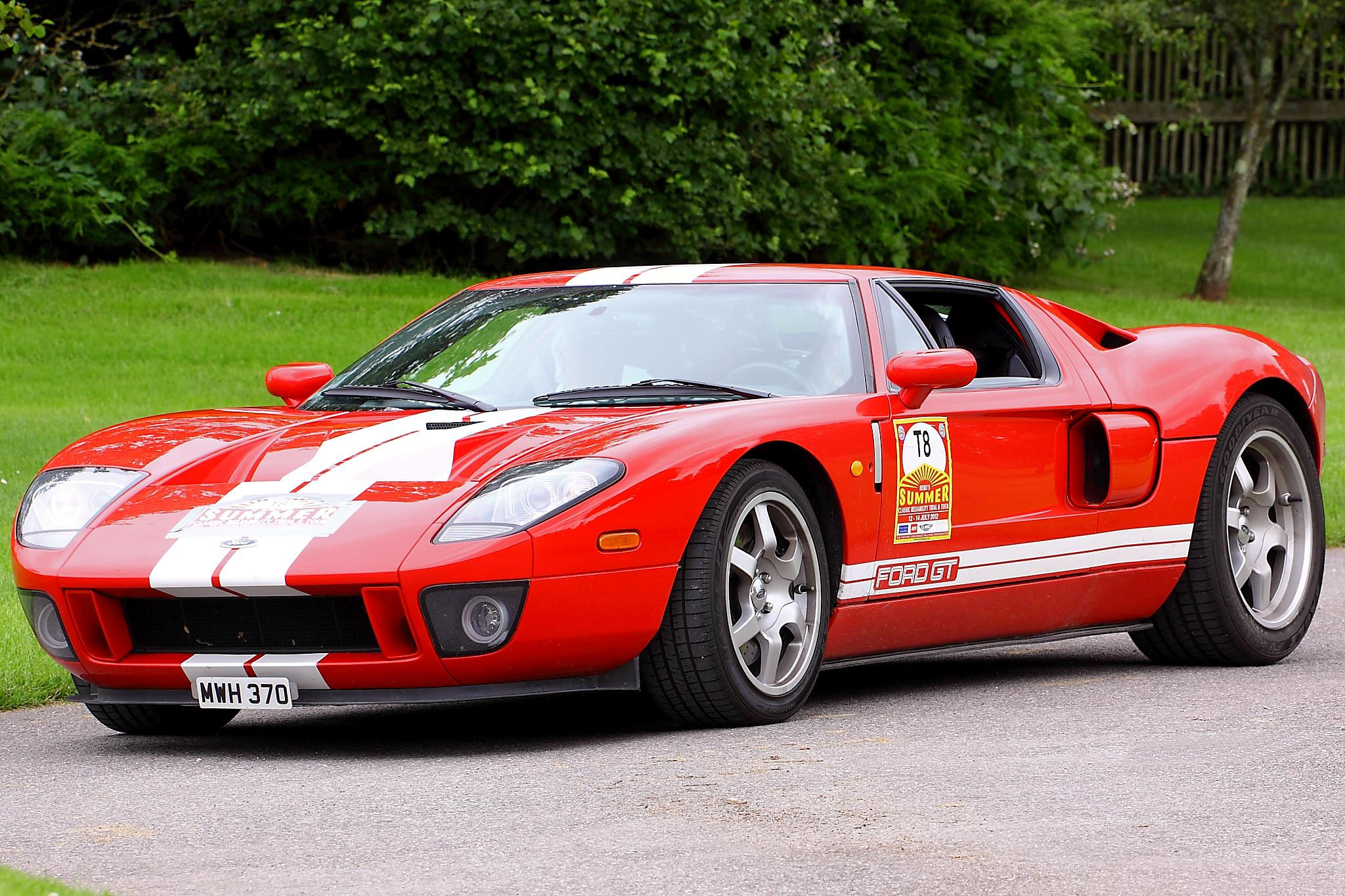 Ford GT 40 - Beaulieu